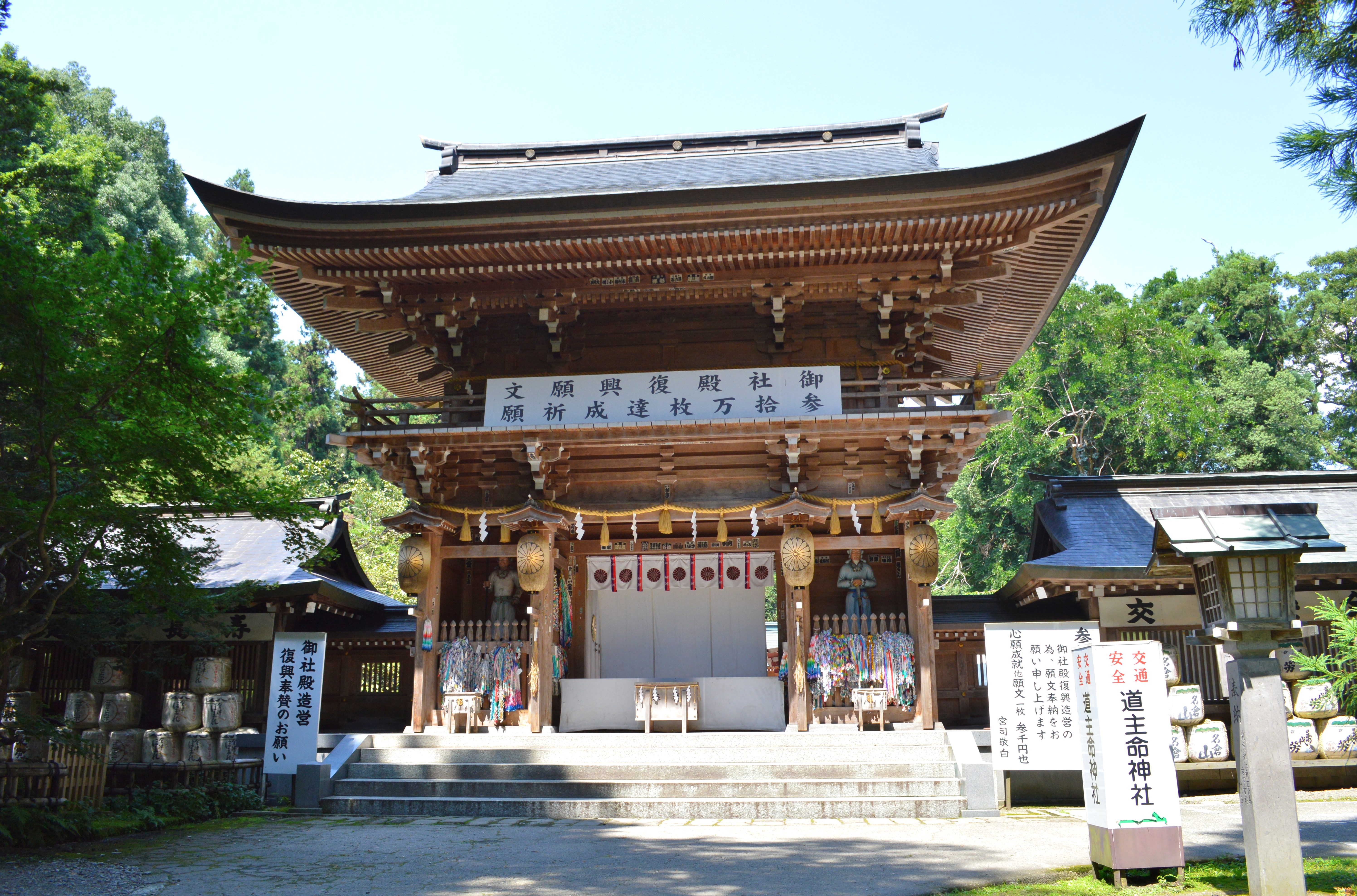 伊佐須美神社 楼門